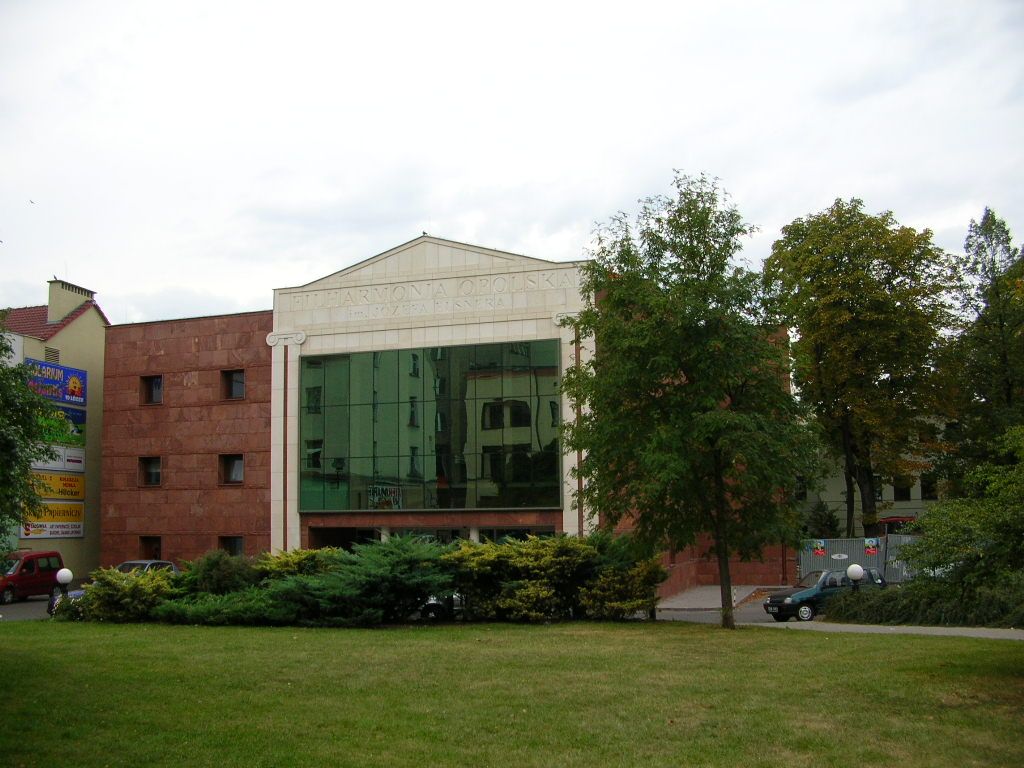 Opole - Filharmonia im . Elsnera Autor - Bartek Wawraszko ( Bast )